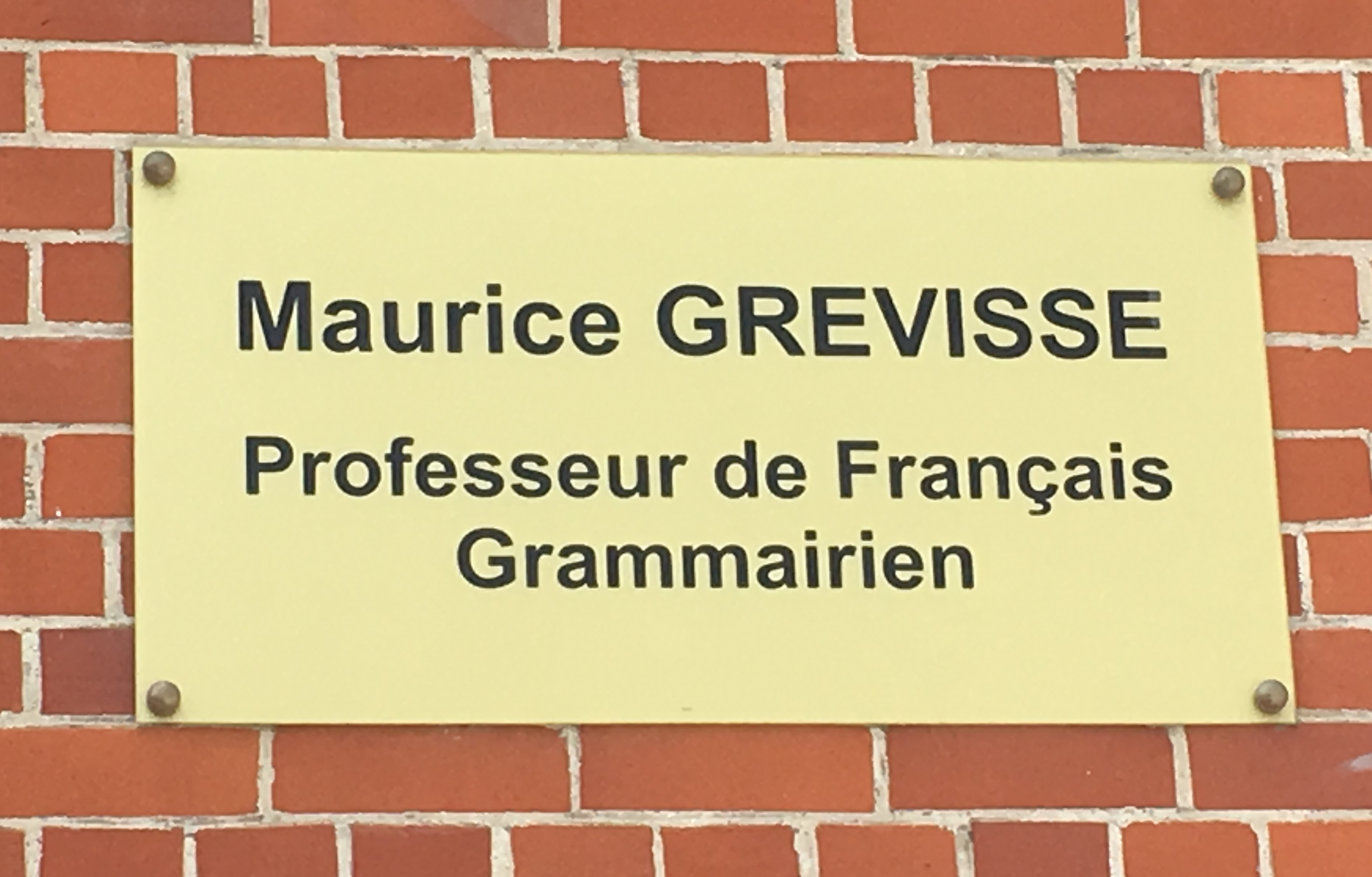 Gedenktafel für den belgischen Grammatiker Maurice Grevisse in der Europäischen Schule 4 in Brüssel-Laeken